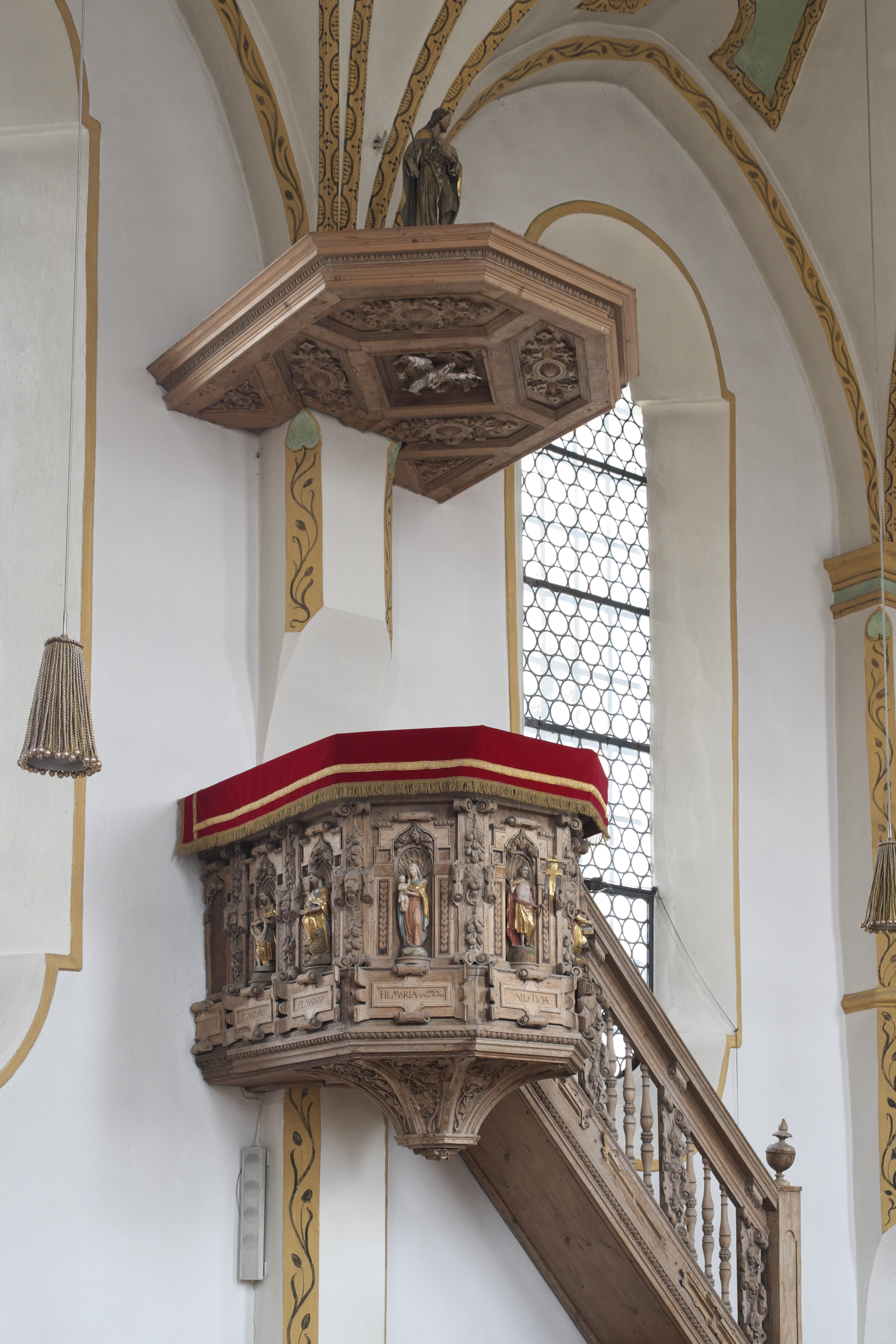 Katholische Pfarrkirche St. Andreas in Aying im Landkreis München (Bayern/Deutschland), Kanzel von Georgius Holzmann und Heinrich Schickhardt (Hainrich Schickhart)